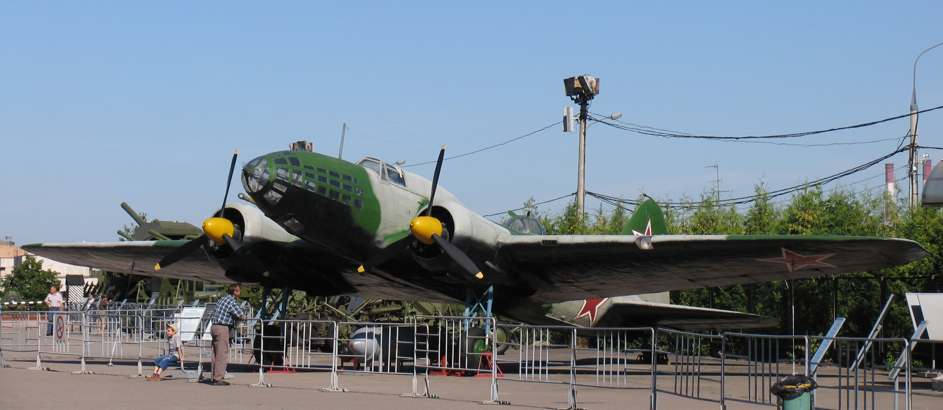 Il-4 front view in Moscow/На Поклонной горе